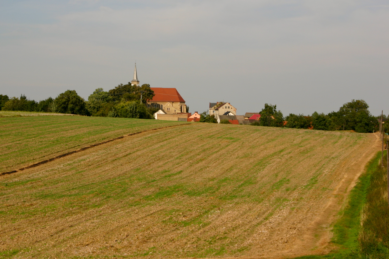 Kolnowice (dodatkowa nazwa w j. niem. Kohlsdorf) - wieś w Polsce położona w województwie opolskim, w powiecie prudnickim, w gminie Biała.